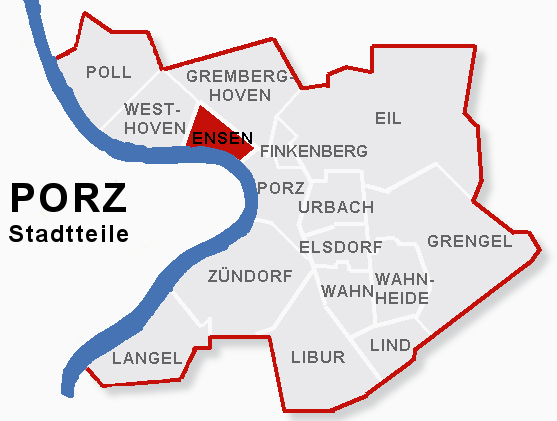 Lage des Stadtteils Ensen im Stadtbezik Porz